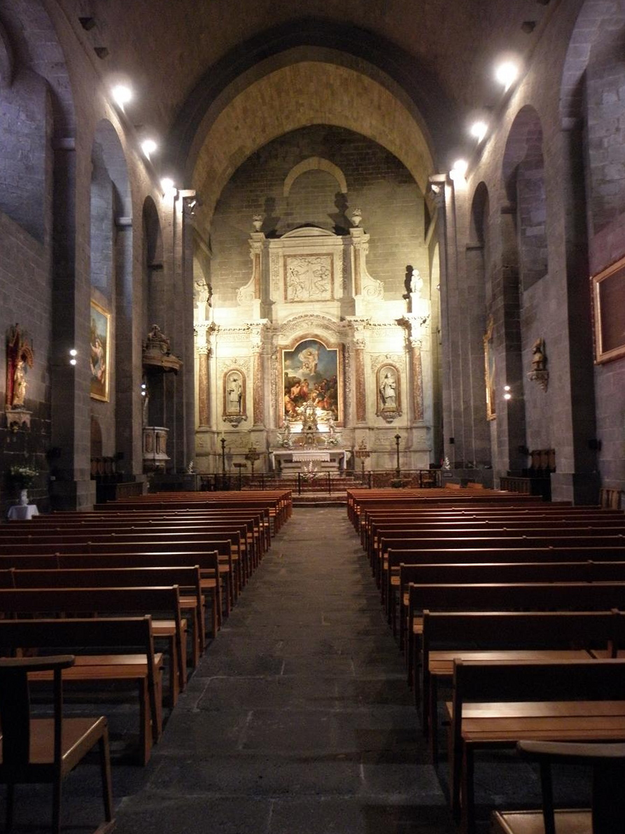 Intérieur de la cathédrale Saint-Étienne d'Agde (34).